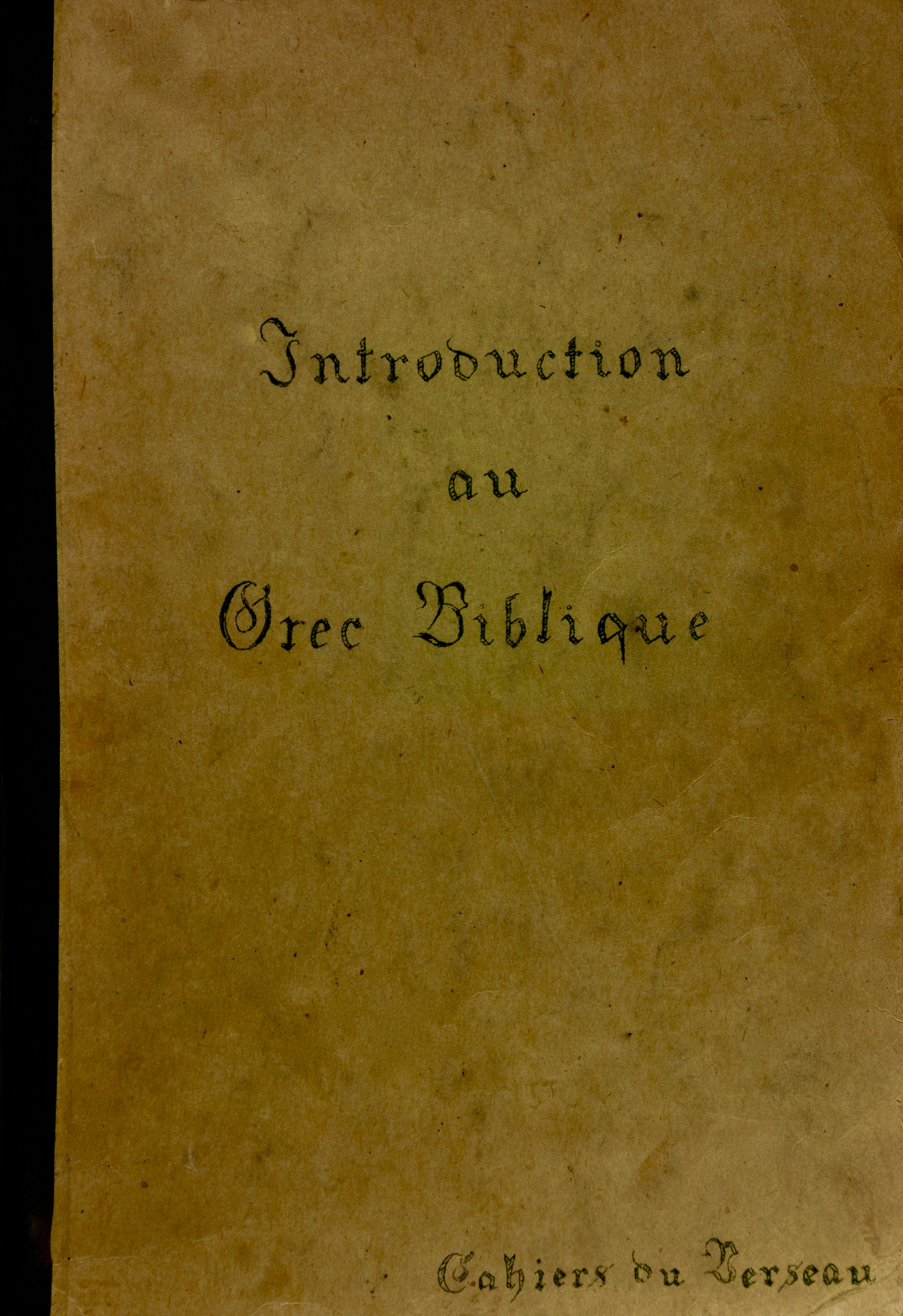 Méthode d'apprentissage du grec biblique